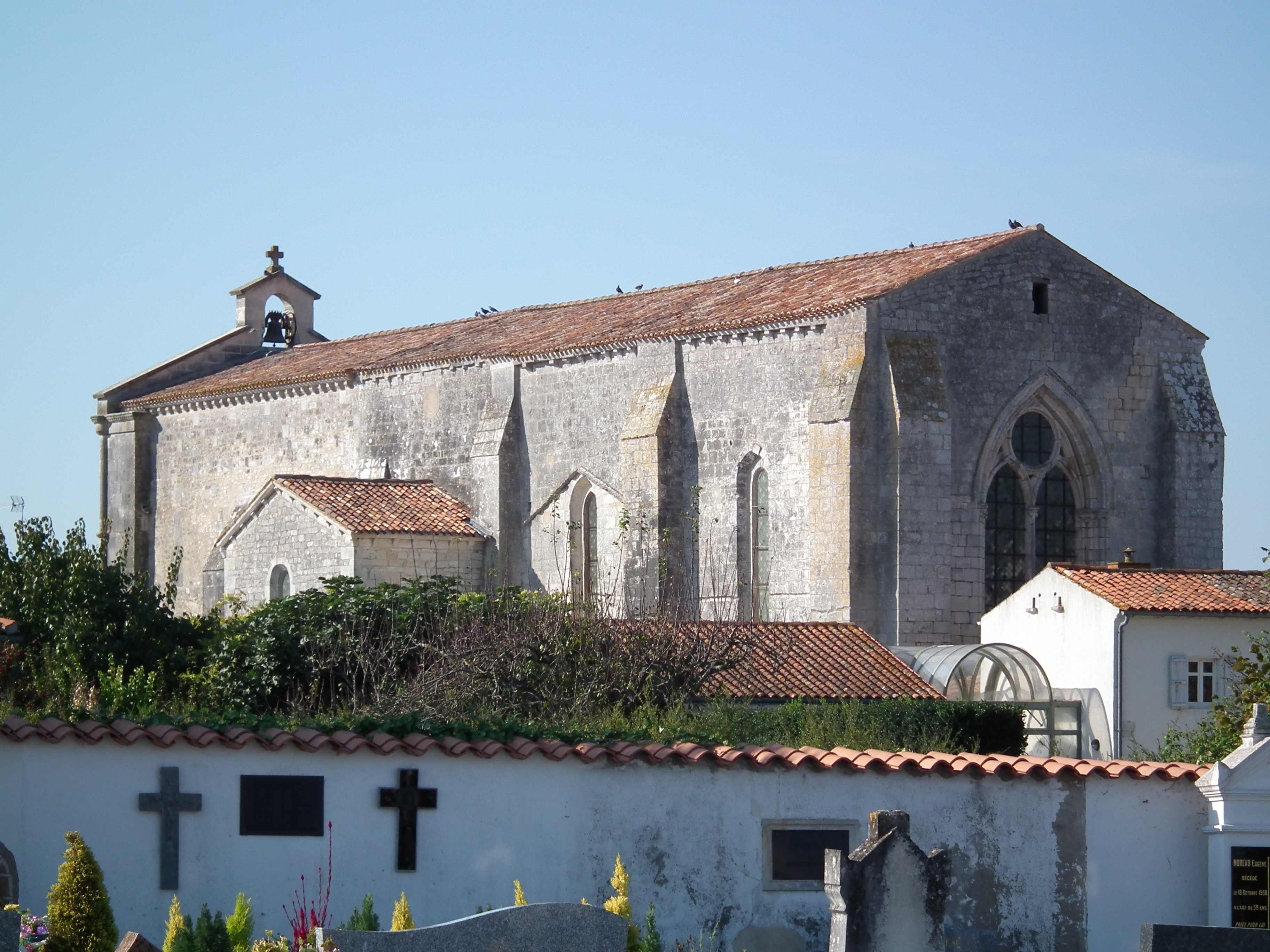 Chevet de l'église de Médis